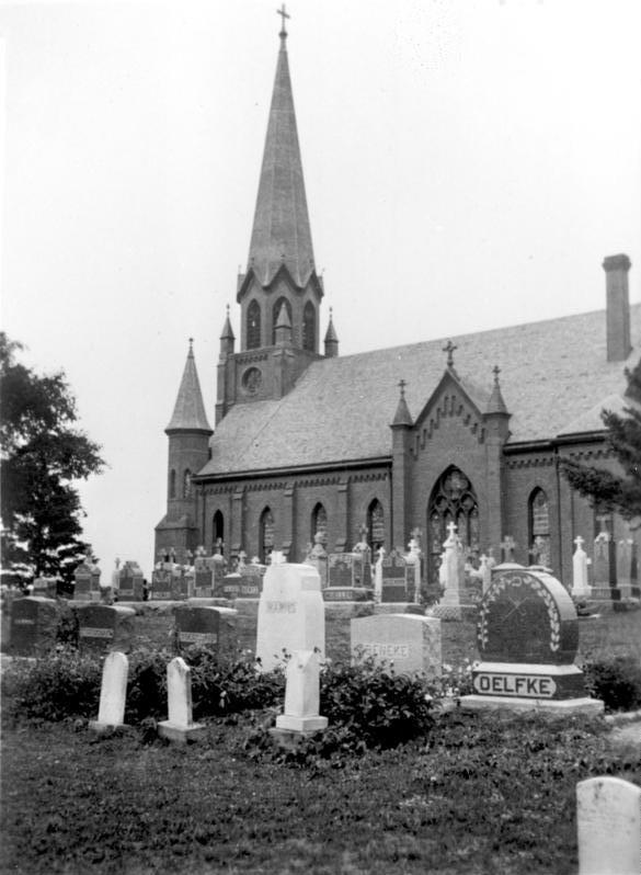 Vereinigte Staaten, Minnesota, evangel. Kirche in Hamburg.